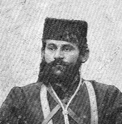 Васил Аджаларски.